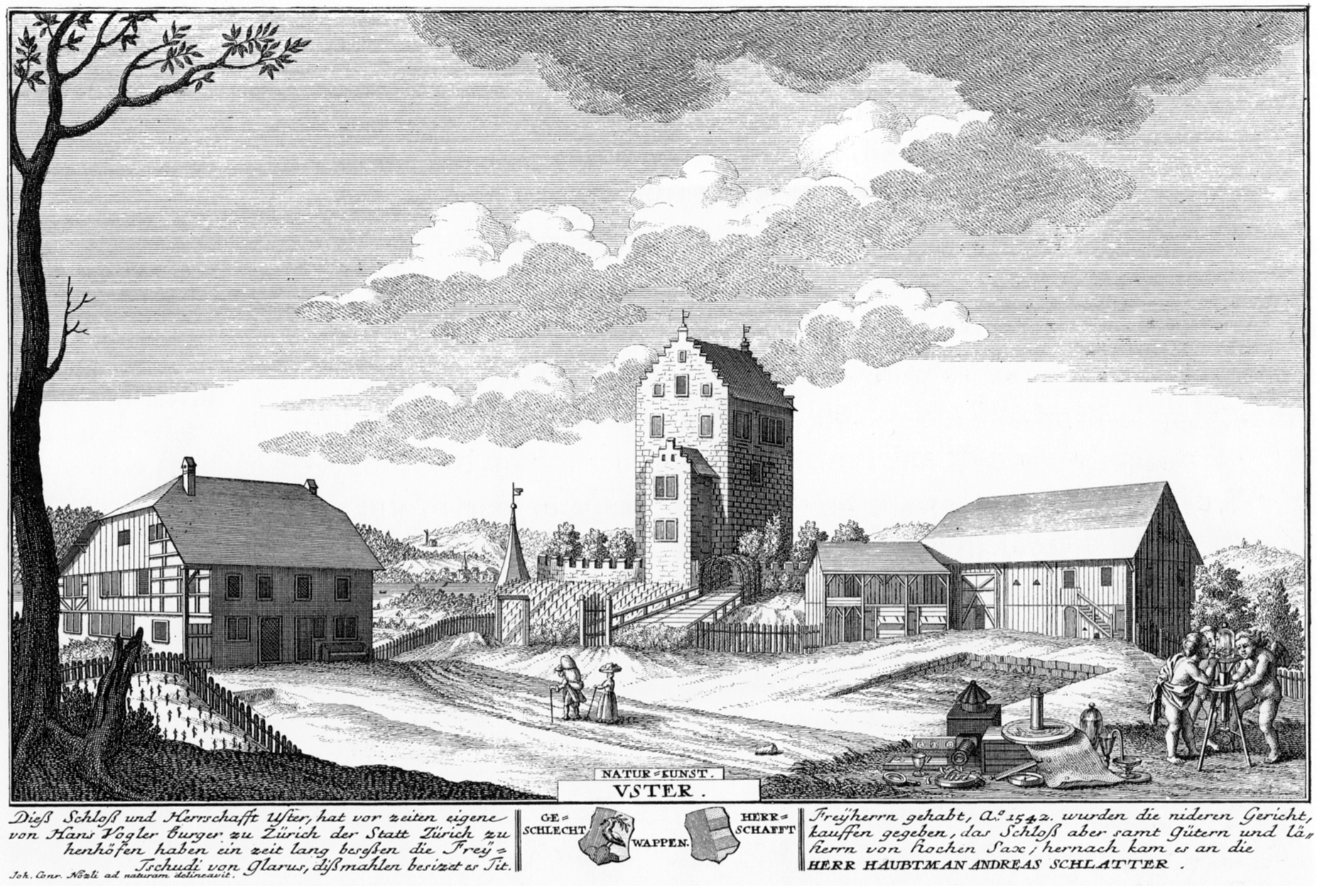 Schloss Uster 1742. Radierung von David Herrliberger nach einer Tuschezeichnung von Hans Conrad Nözli. Erschienen in Herrlibergers Eigentliche Vorstellung der Adelichen Schlösser im Zürich Gebieth, Blatt 13, zweite Lieferung 1743